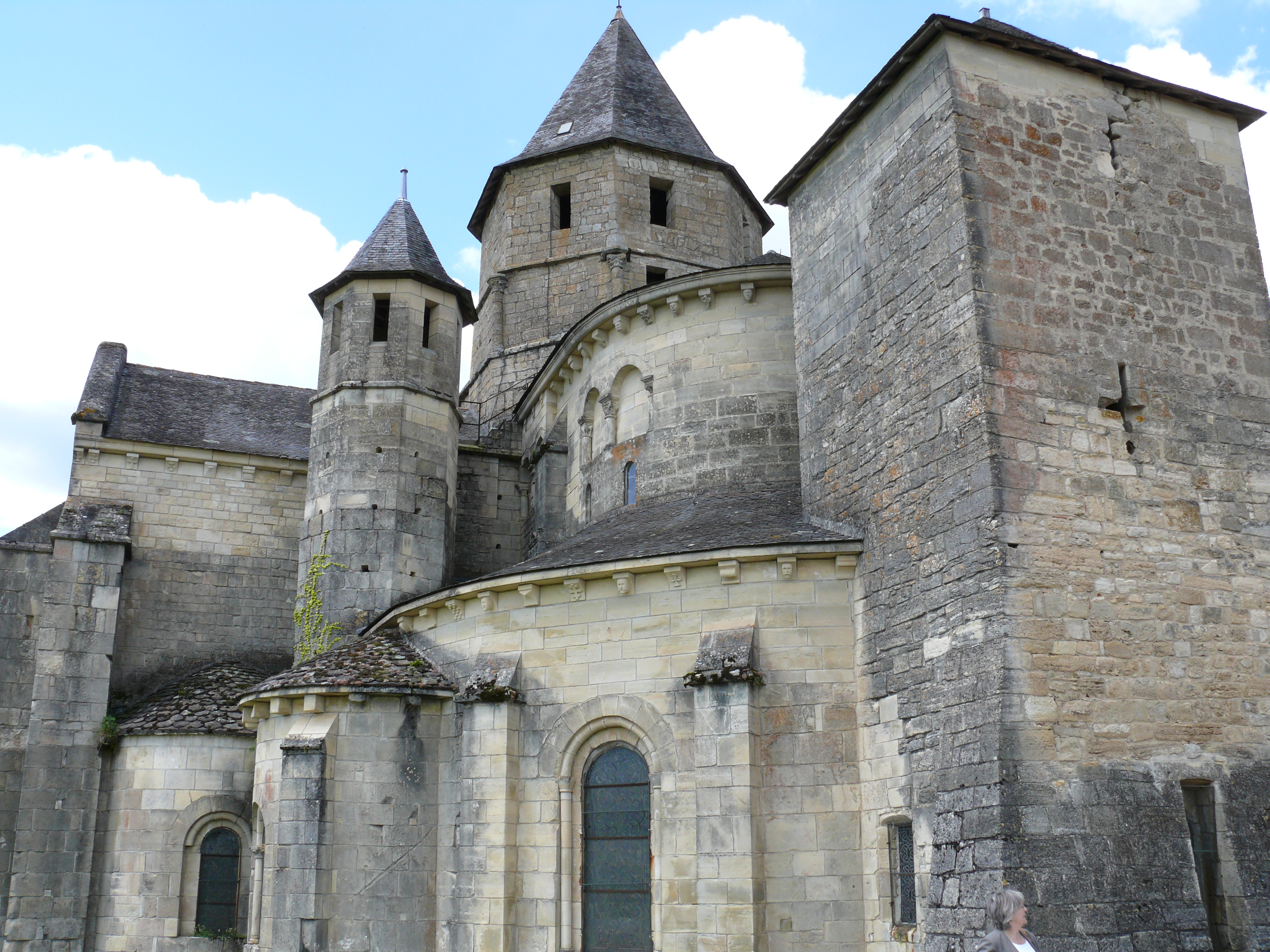 Saint-Robert - Eglise Saint-Robert - Chevet